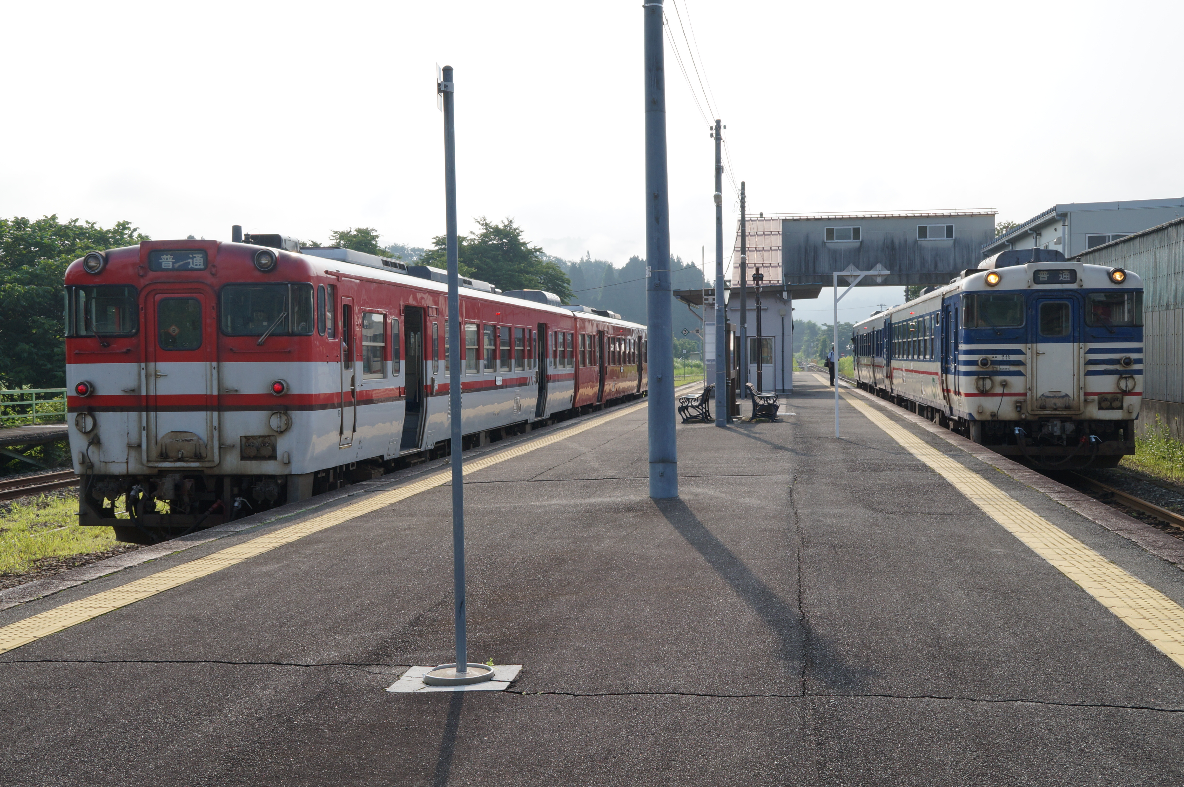 １番線(右)・２番線(左)